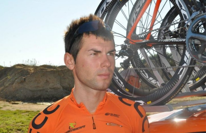 Kamil Zieliński